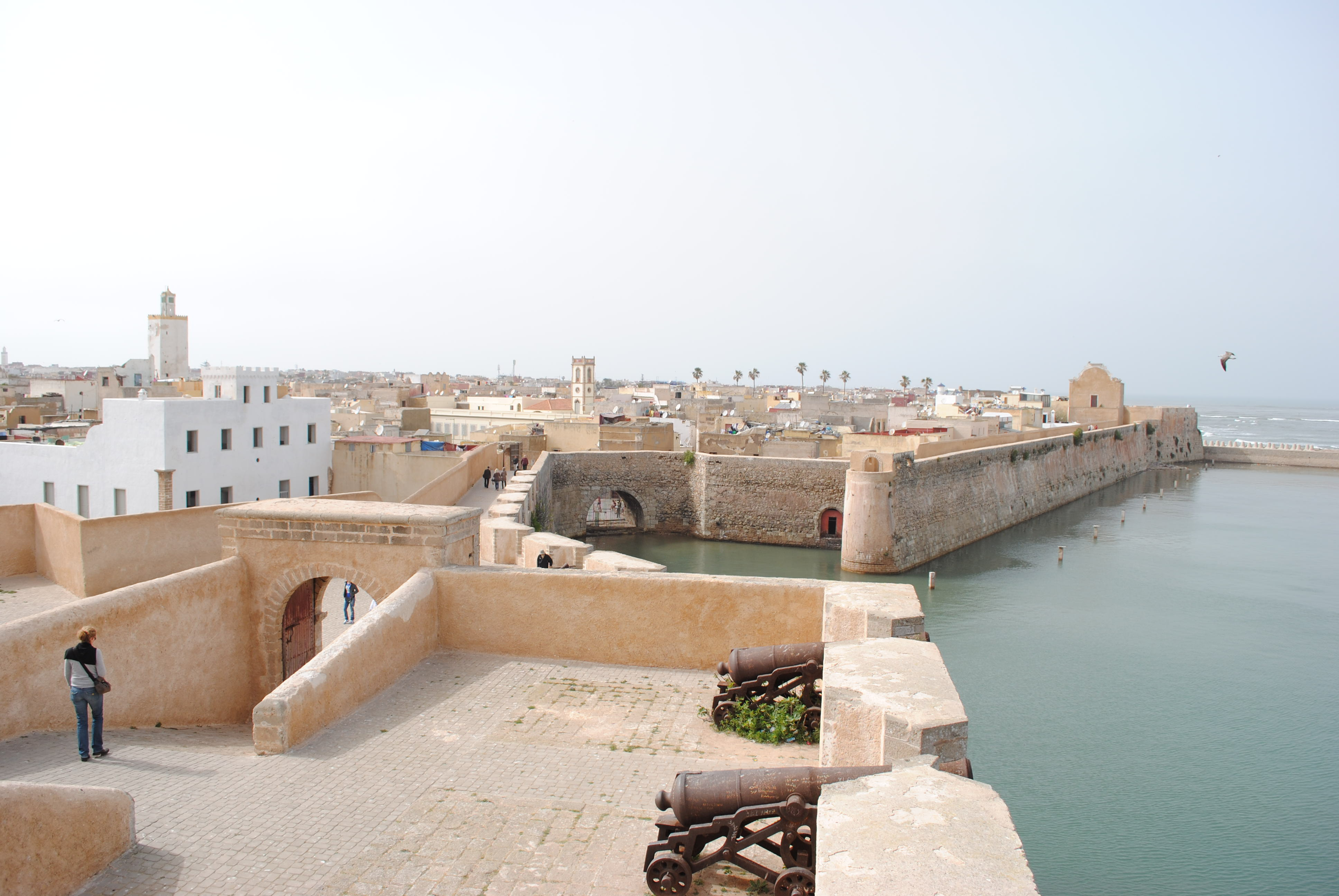 Forteresse d'el Jadida